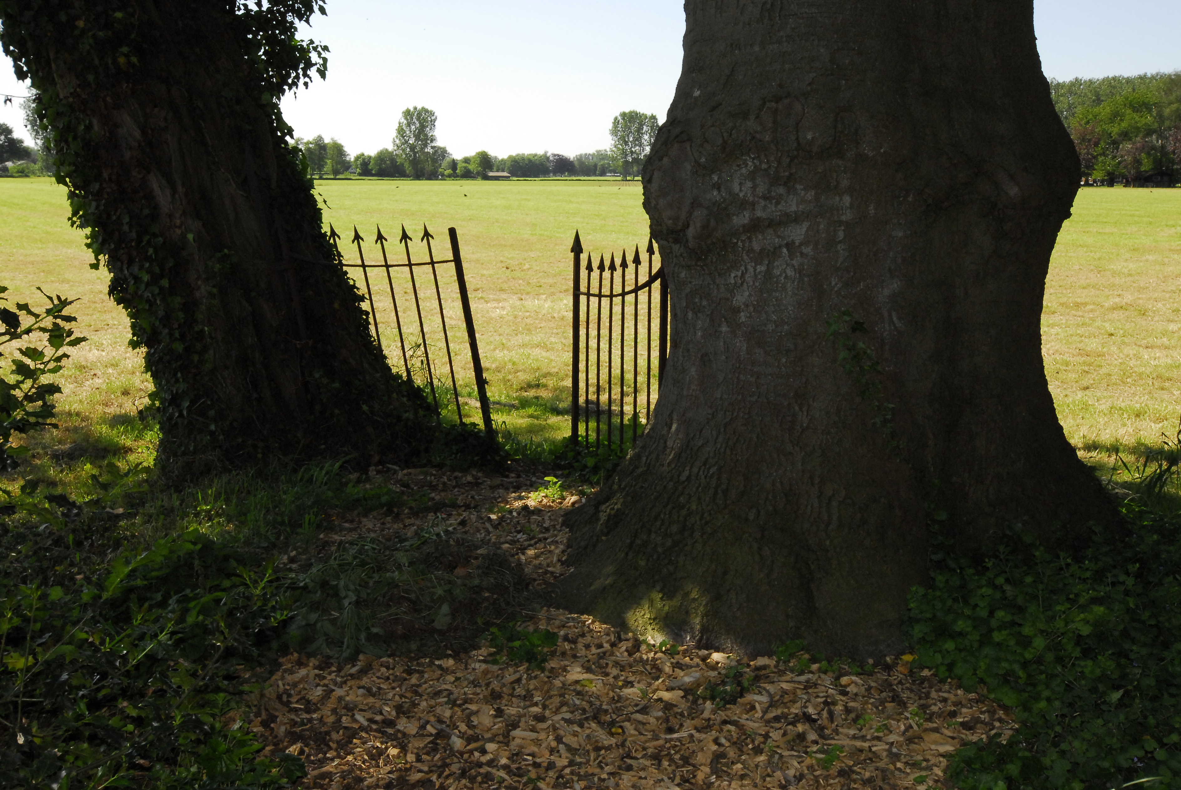 Het poortje achter de Antoniuskapel hoorde bij het voormalige Huis Sinderen.